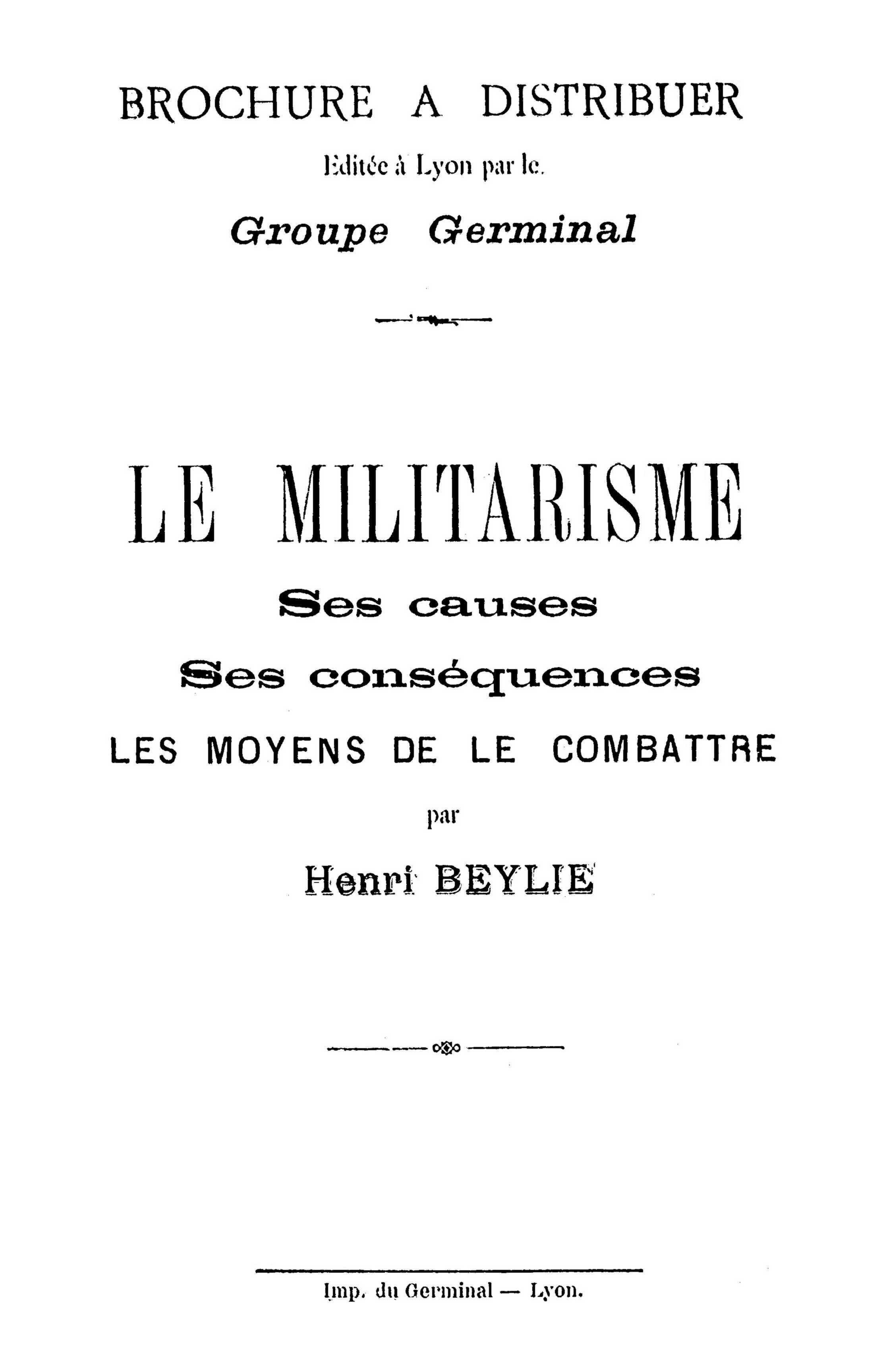 Henri Beylie - Le Militarisme. Ses causes, ses conséquences, les moyens de le combattre, brochure éditée par le groupe Germinal de Lyon, 1903.